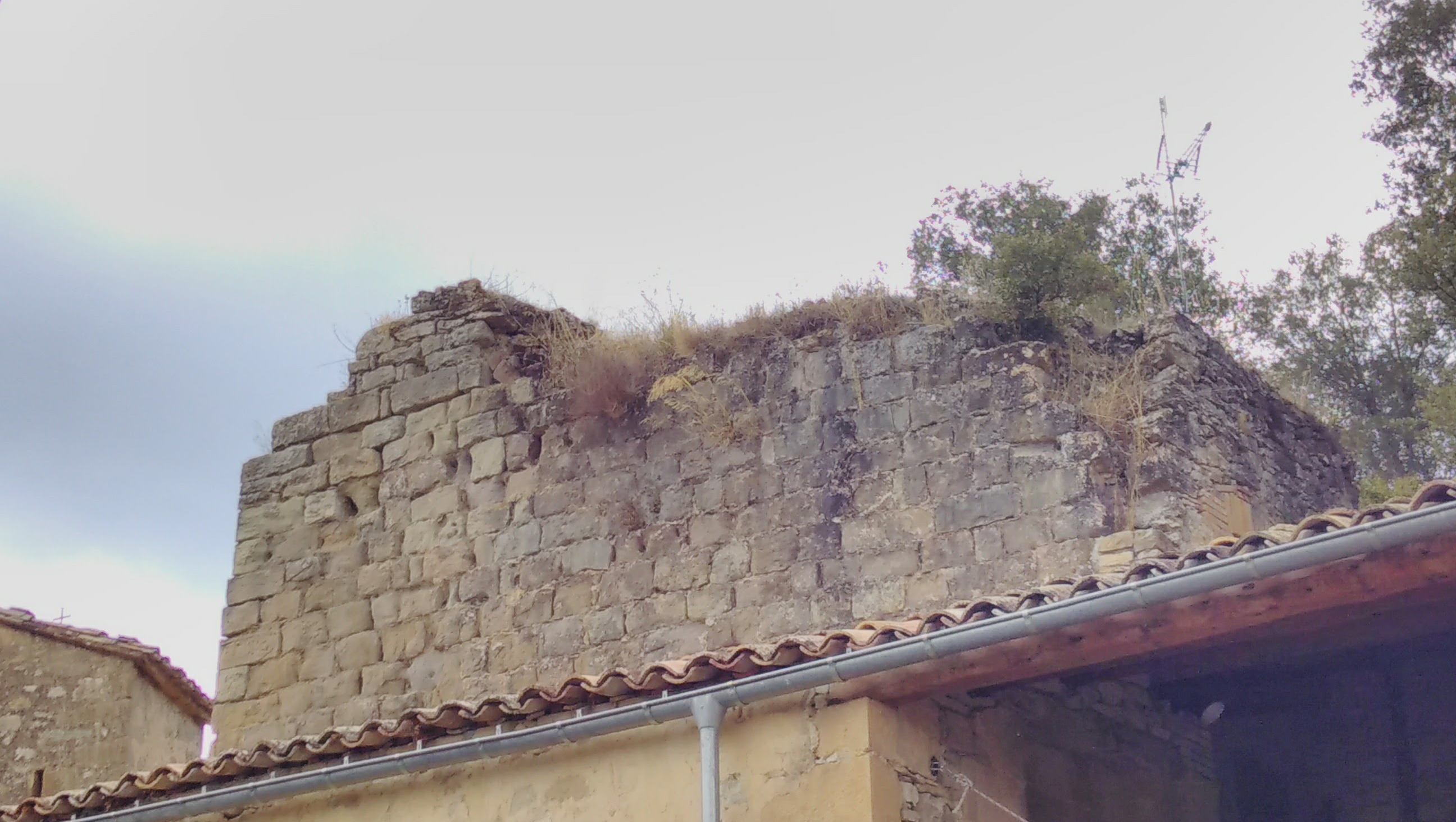 Castell de Claret dels Cavallers